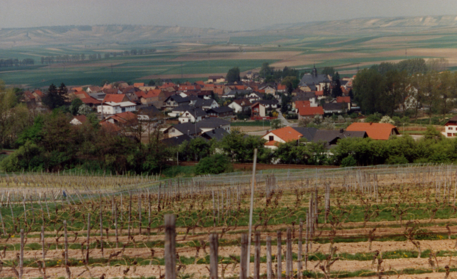 Sulzheim (Rhénanie-Palatinat)